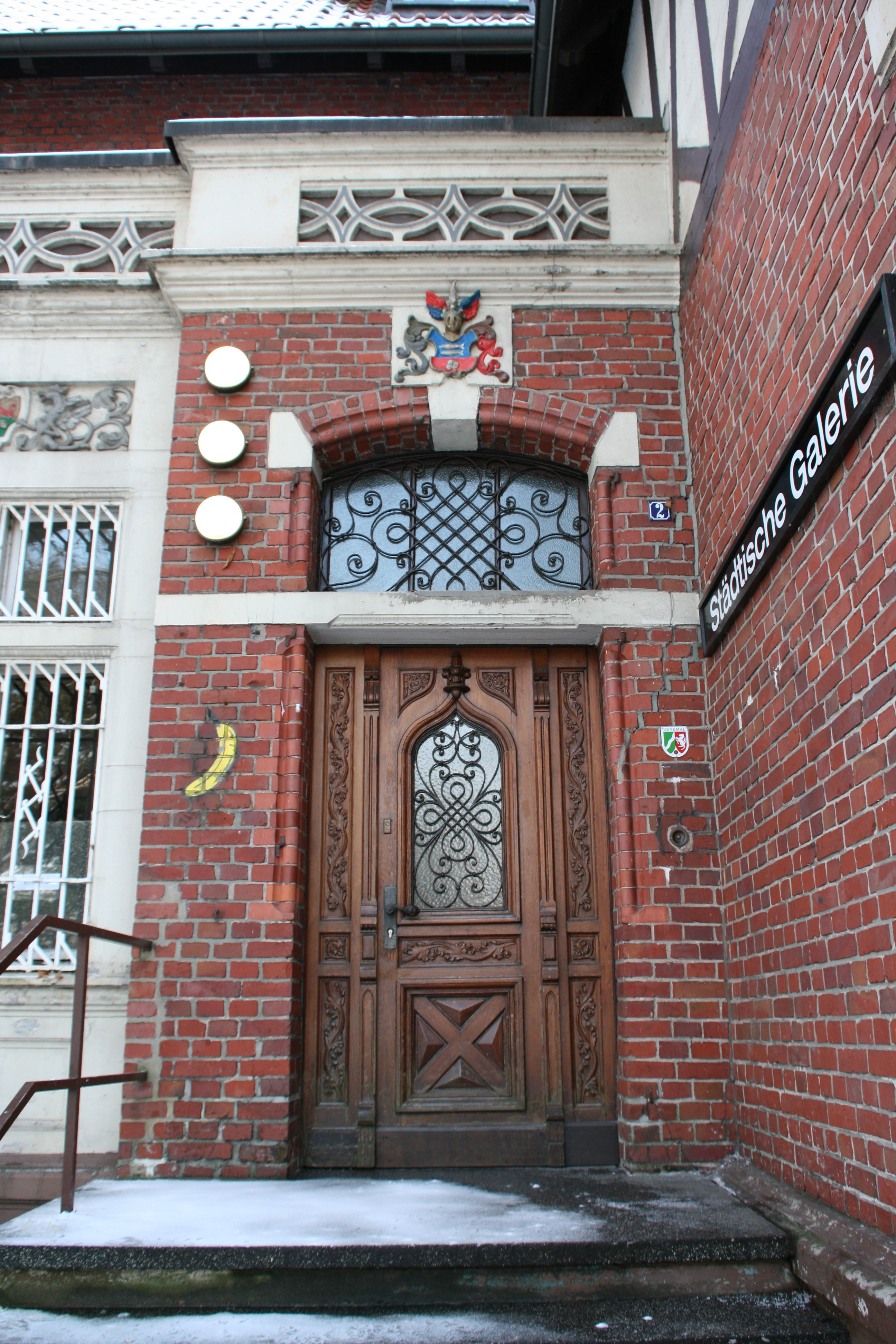 Städtische Galerie in der Villa Forell, Karl-Brandt-Weg 2, Schlosspark Strünkede in Herne